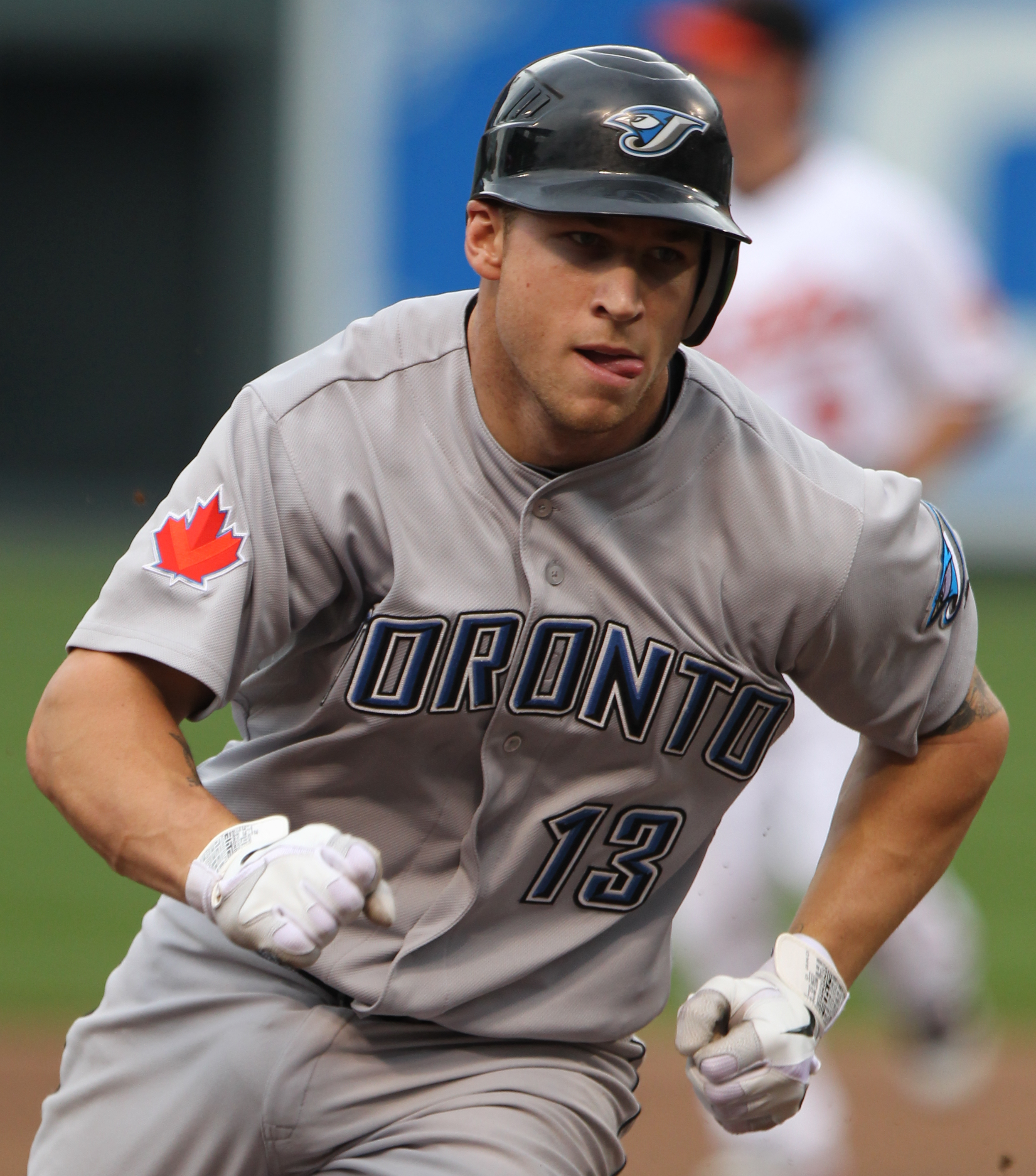 Brett Lawrie - September 1, 2011